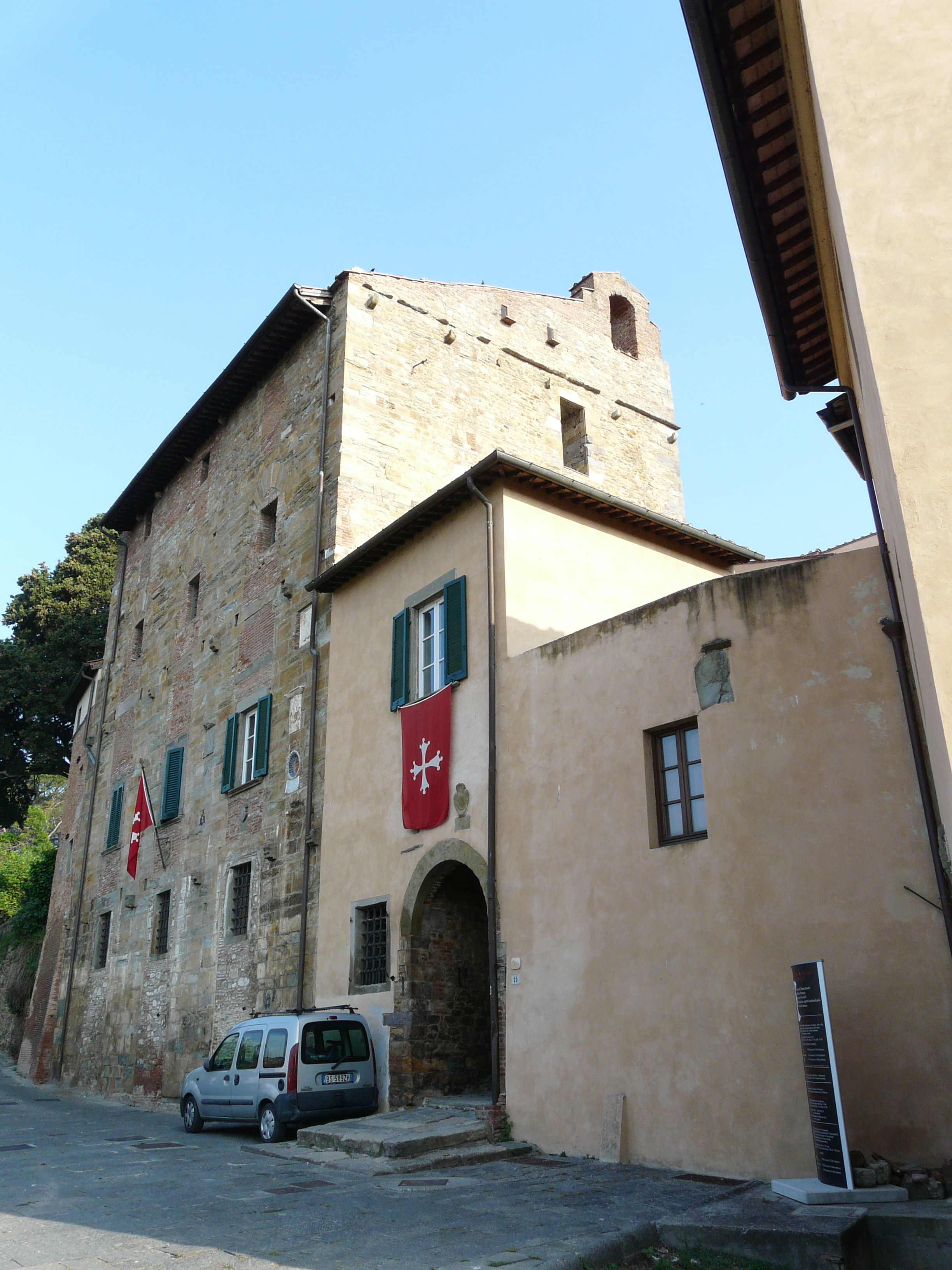 Palazzo Pretorio, Comune di Vicopisano, Toscana, Italia